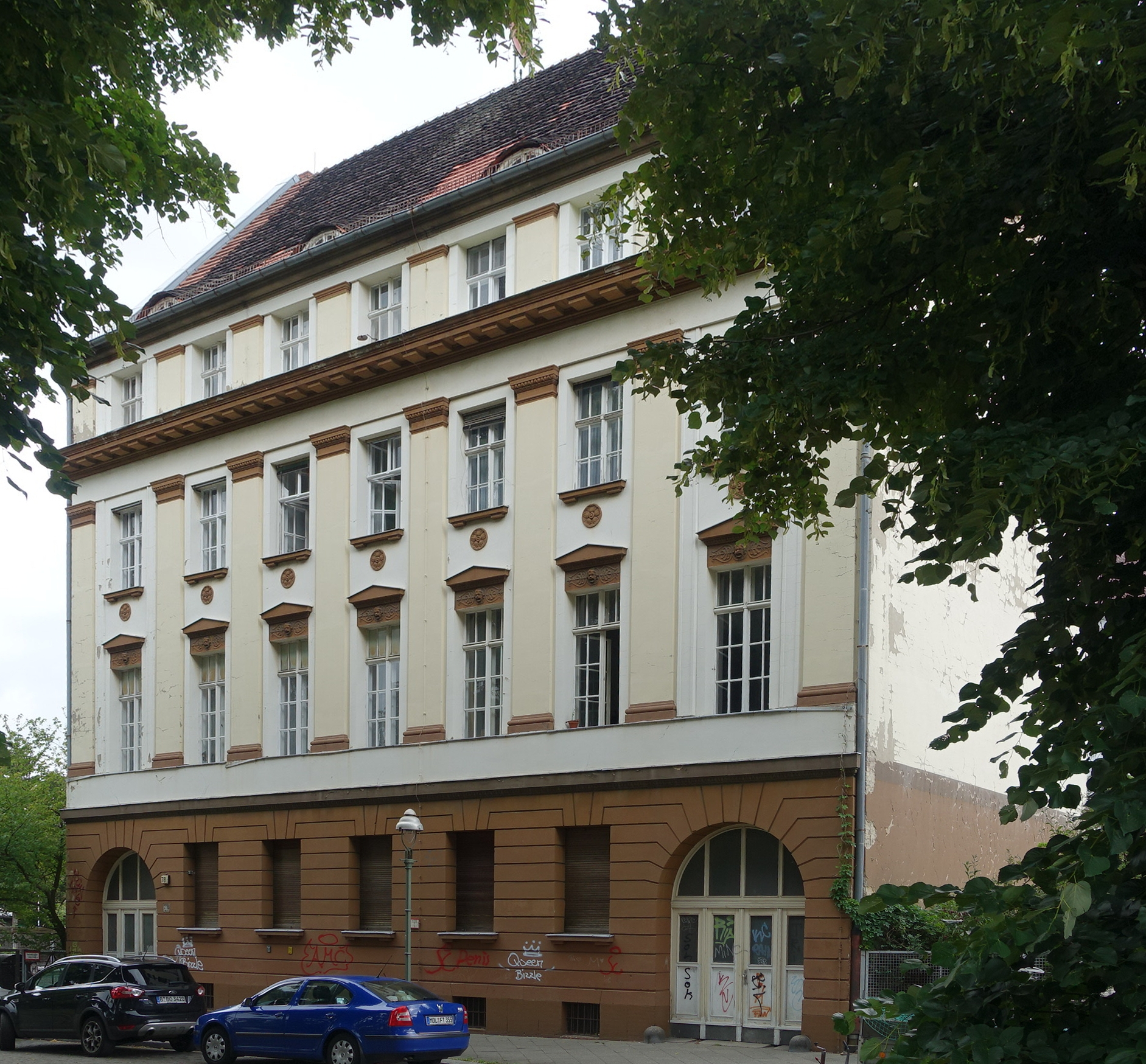 Lehrerwohnhaus